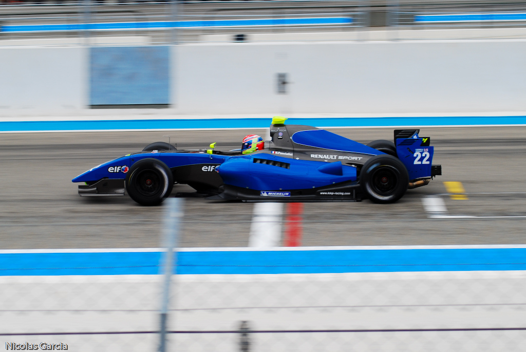 22 Nelson Panciatici - KMP Racing - 2011 Formula Renault 3.5 Series - Circuit Paul Ricard - Race 2